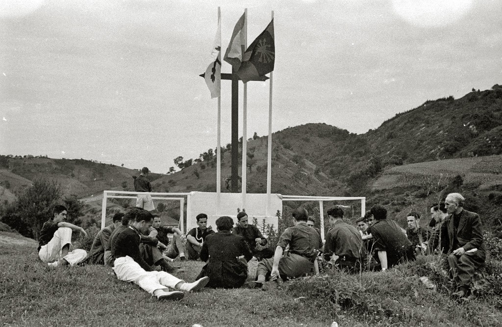 Título original: Visita de las autoridades a los campamentos de las O.J.E. en Orio (16/20) Localización: Orio (Guipúzcoa)